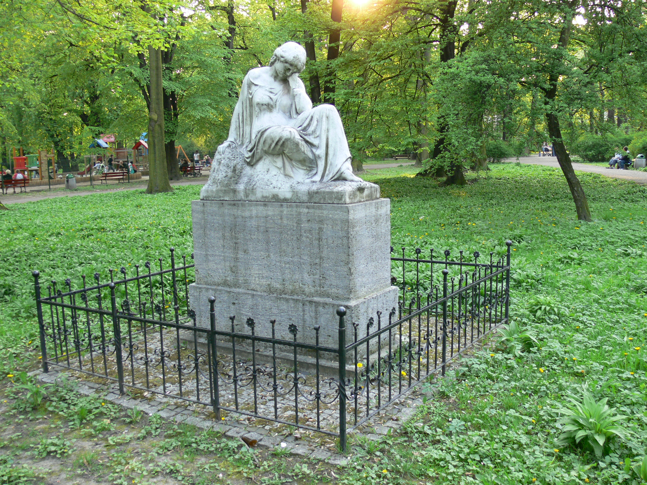 Racibórz — Park im. Miasta Roth: rzeźba nagrobna Ludwika Reinersa